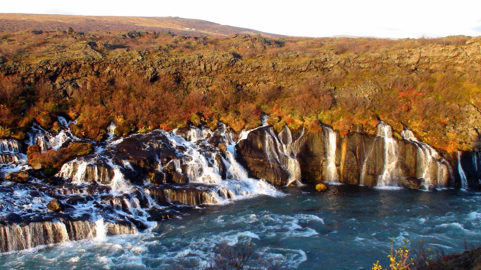 Hraunfossar